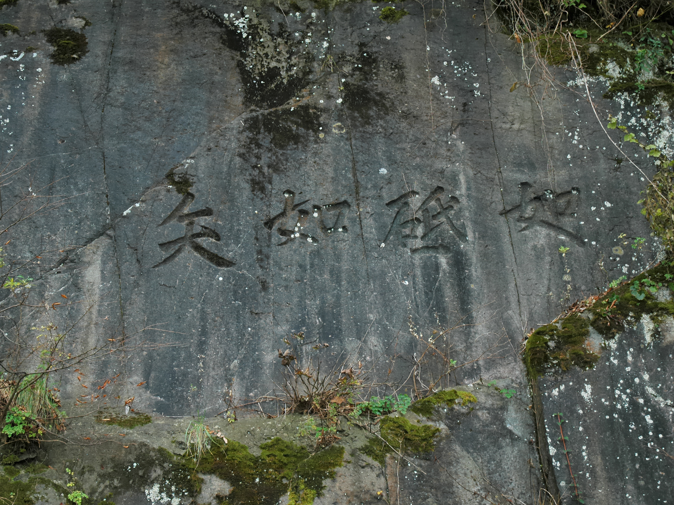 Oyashirazu (親不知 親不知コミュニティロードにある「如砥如矢」（とのごとくやのごとし）の文字。1988年に道路が開通した際の記念に刻まれたもの。)